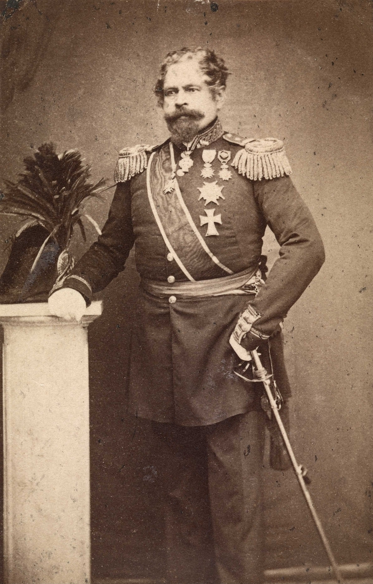 Hans Kirkegaard Fleischer ca. 1865